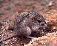 desert pocket mouse (Chaetodipus penicillatus)